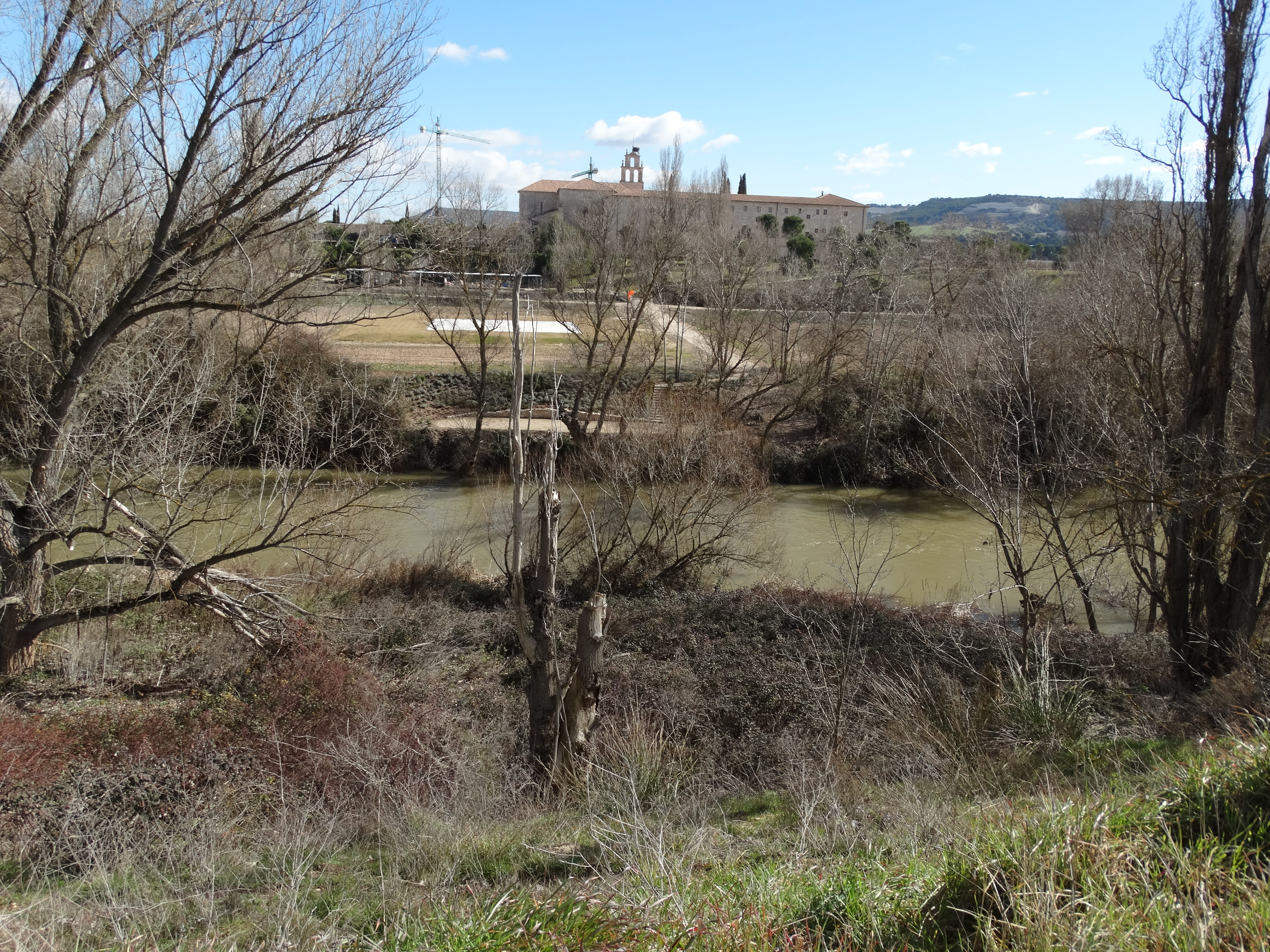 Abadía de Retuerta vista desde la Granja de Sardón o Sardoncillo. Entre medias se ve el río Duero.